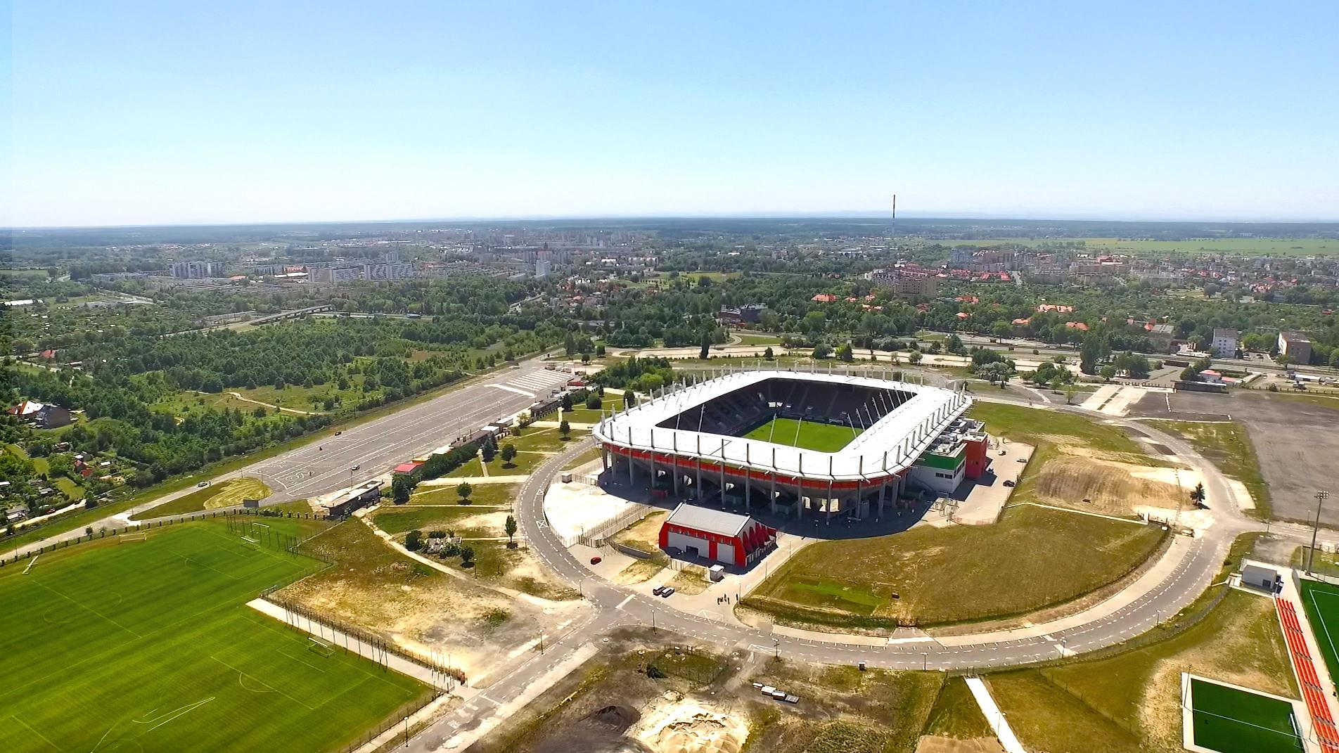 Stadion Zagłębia Lubin z lotu ptaka. FlyRecord.pl 2015